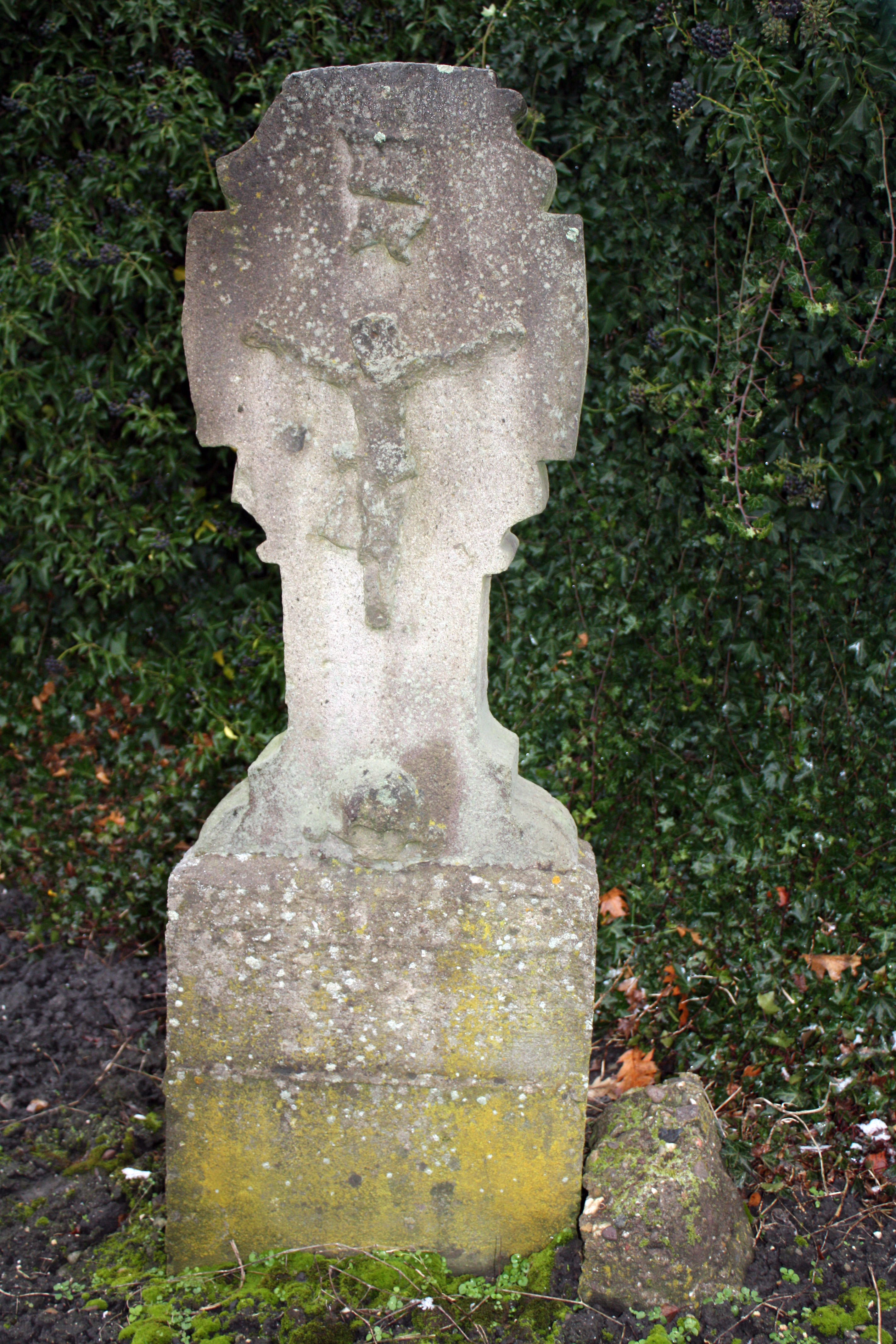 Hürth-Fischenich,Bonnstraße Höhe Marktweg. Grabstein aus Trachyt 18.Jh